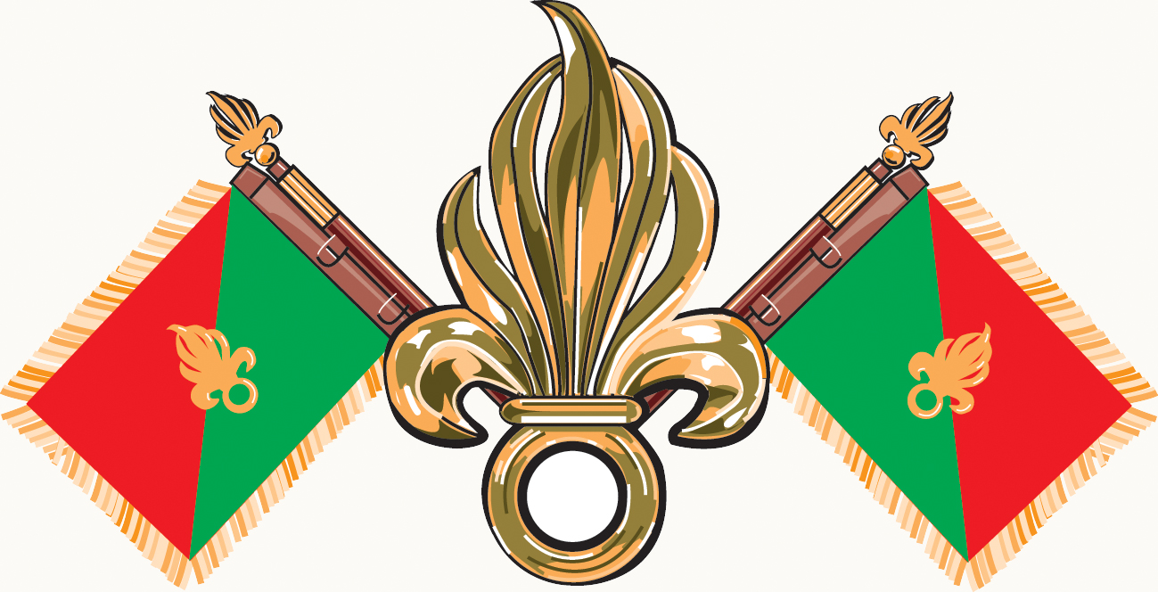 fanions de la Légion étrangère française avec grenades à 7 flammes